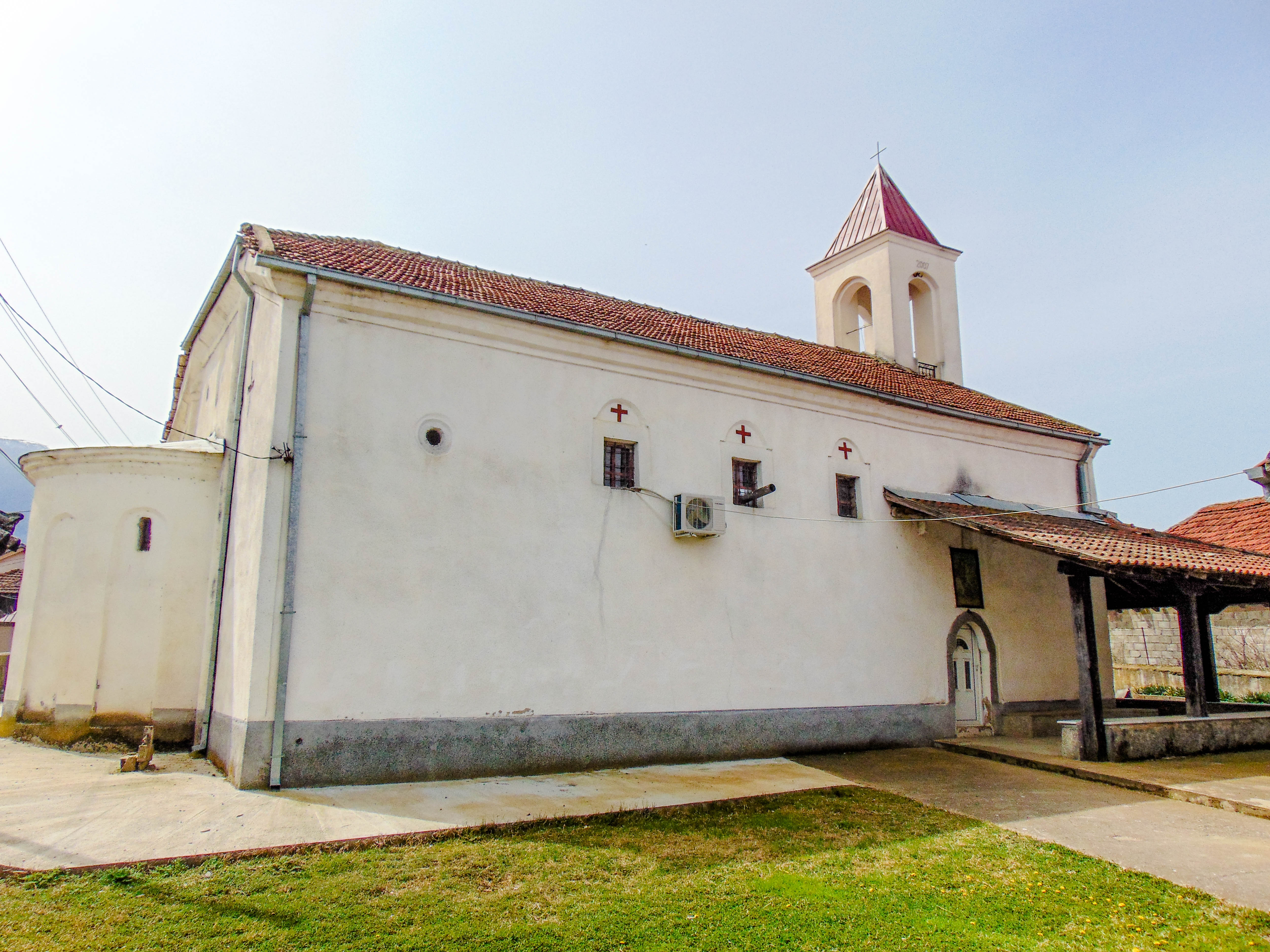 Црква „Св. Ѓорѓи“ - Зубово